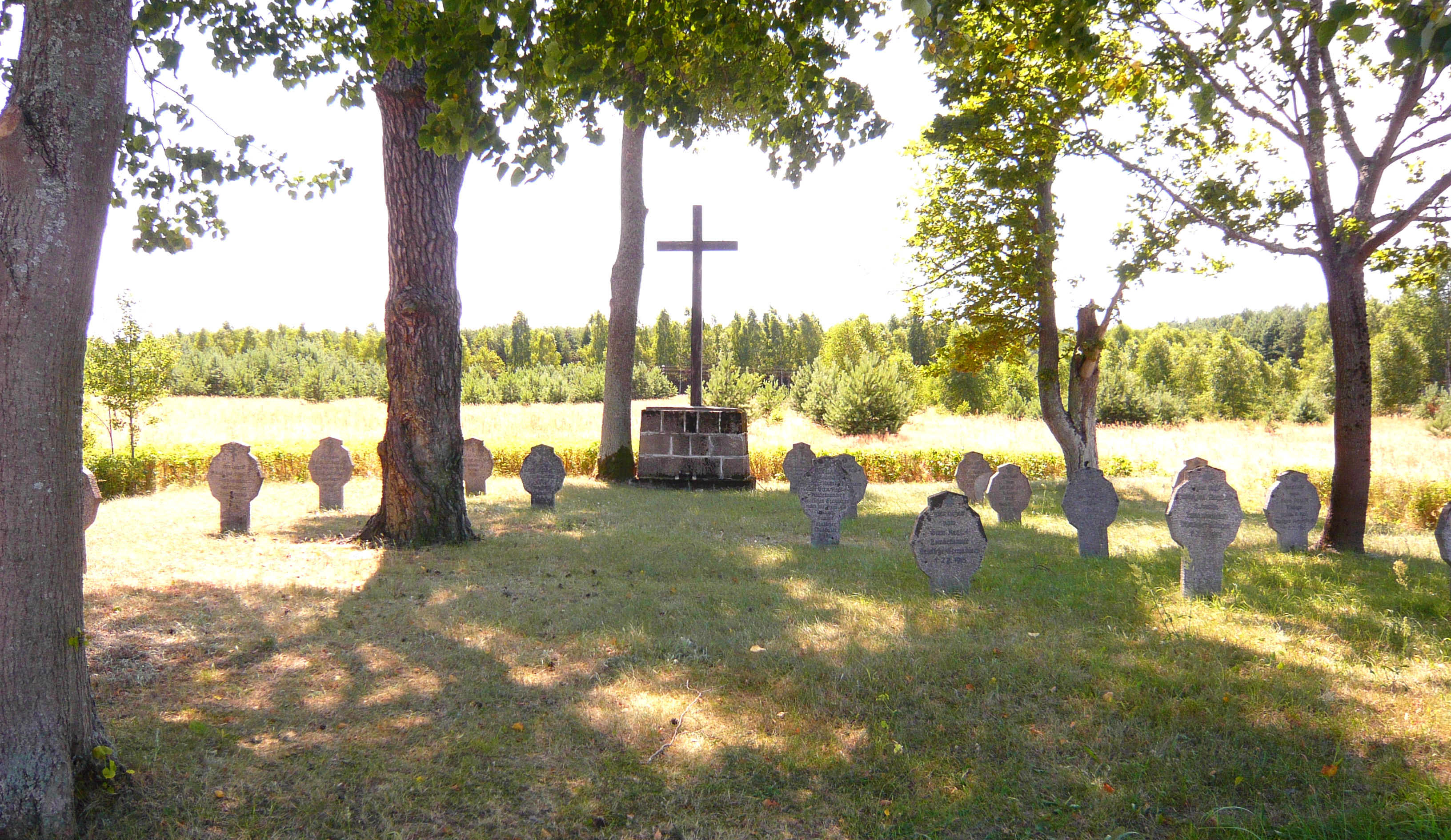 Cmentarz wojenny w Snopkach.